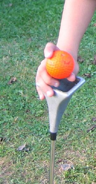 Foto Swin Golf von Stefan Schwingeler selbst aufgenommen